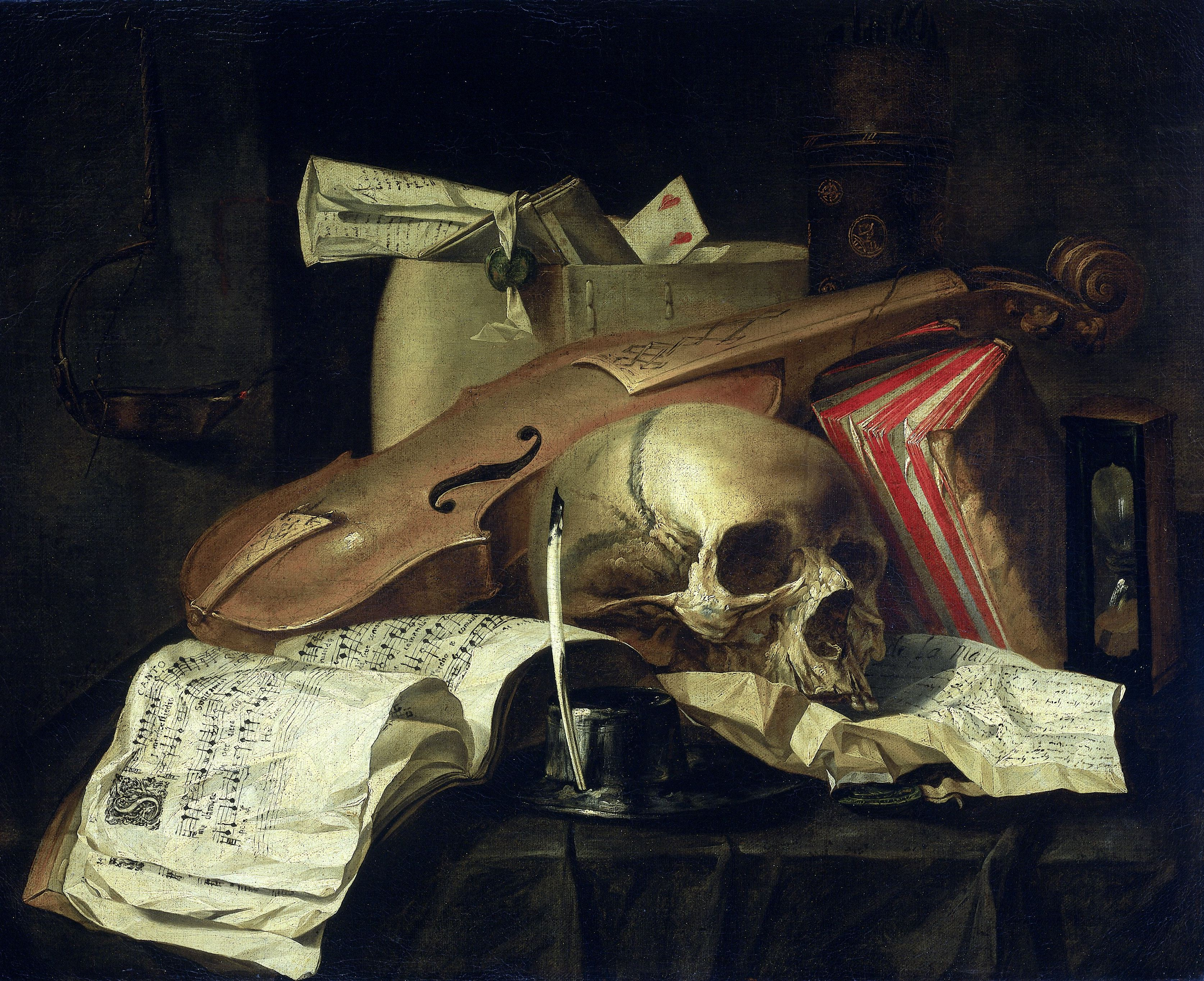 Vanitas stilleven. Op een tafel liggen een viool, een schedel, een liedboek, een inktstel, een verfrommeld brief met zegel, boeken, een zandloper en een tas met documenten. Aan de muur een smeulende olielamp.